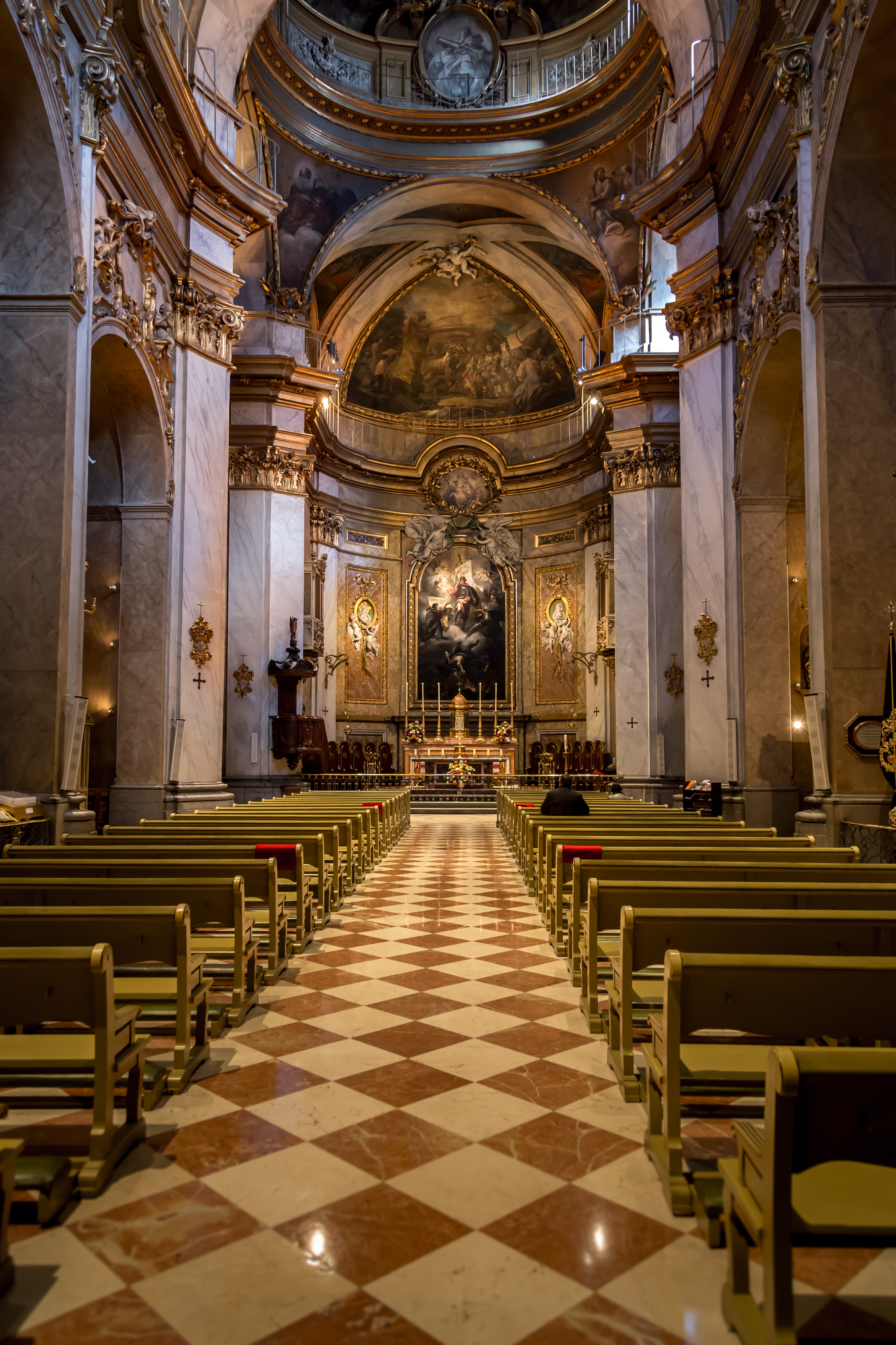 Basílica Pontificia de San Miguel, Madrid.